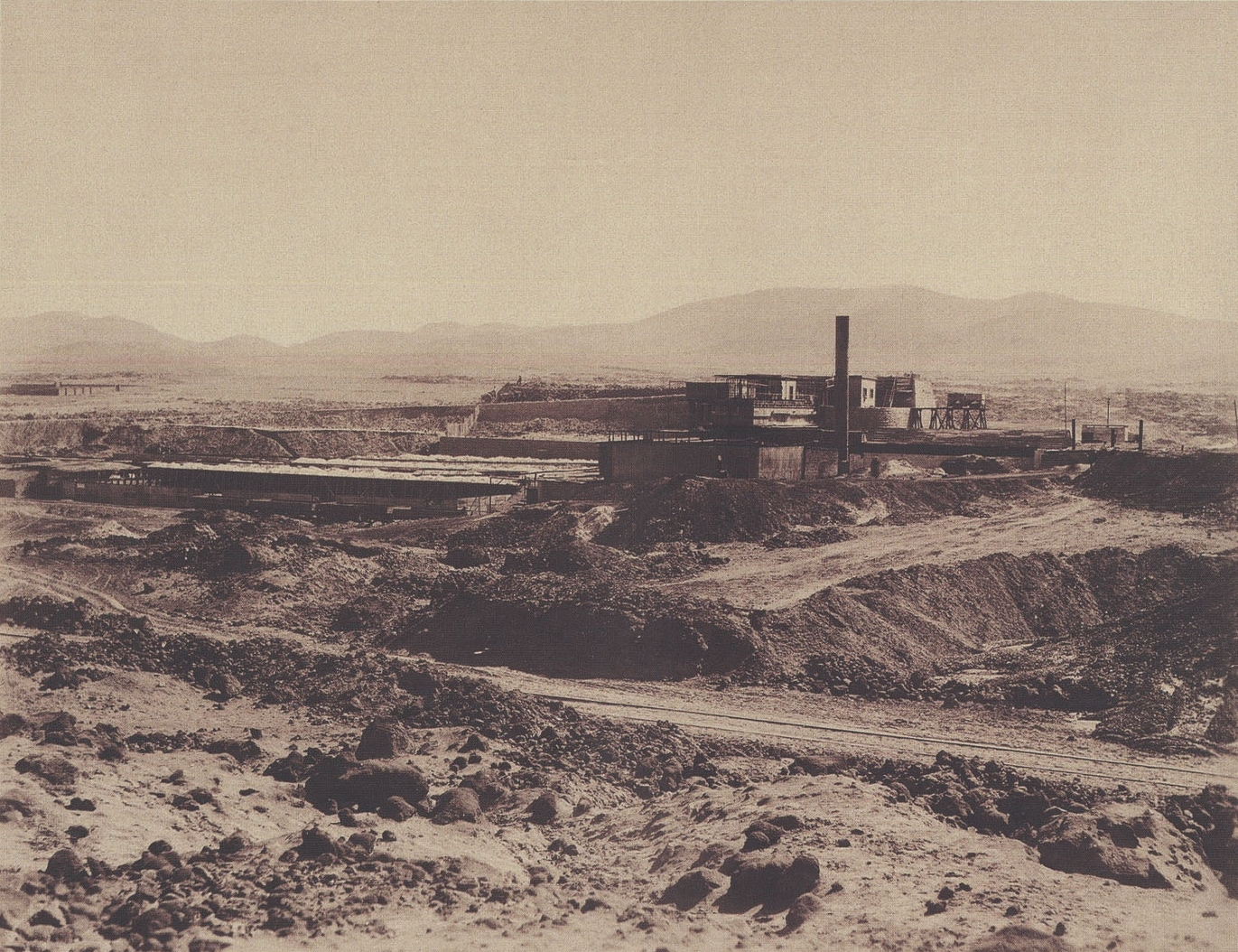 Oficina salitrera Paposo, vista general. La Noria, Chile.